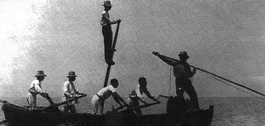 Scilla - Reggio Calabria - Pesca tradizionale del pescespada - antica cartolina - Old postcard